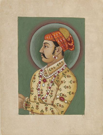 Ram Singh I